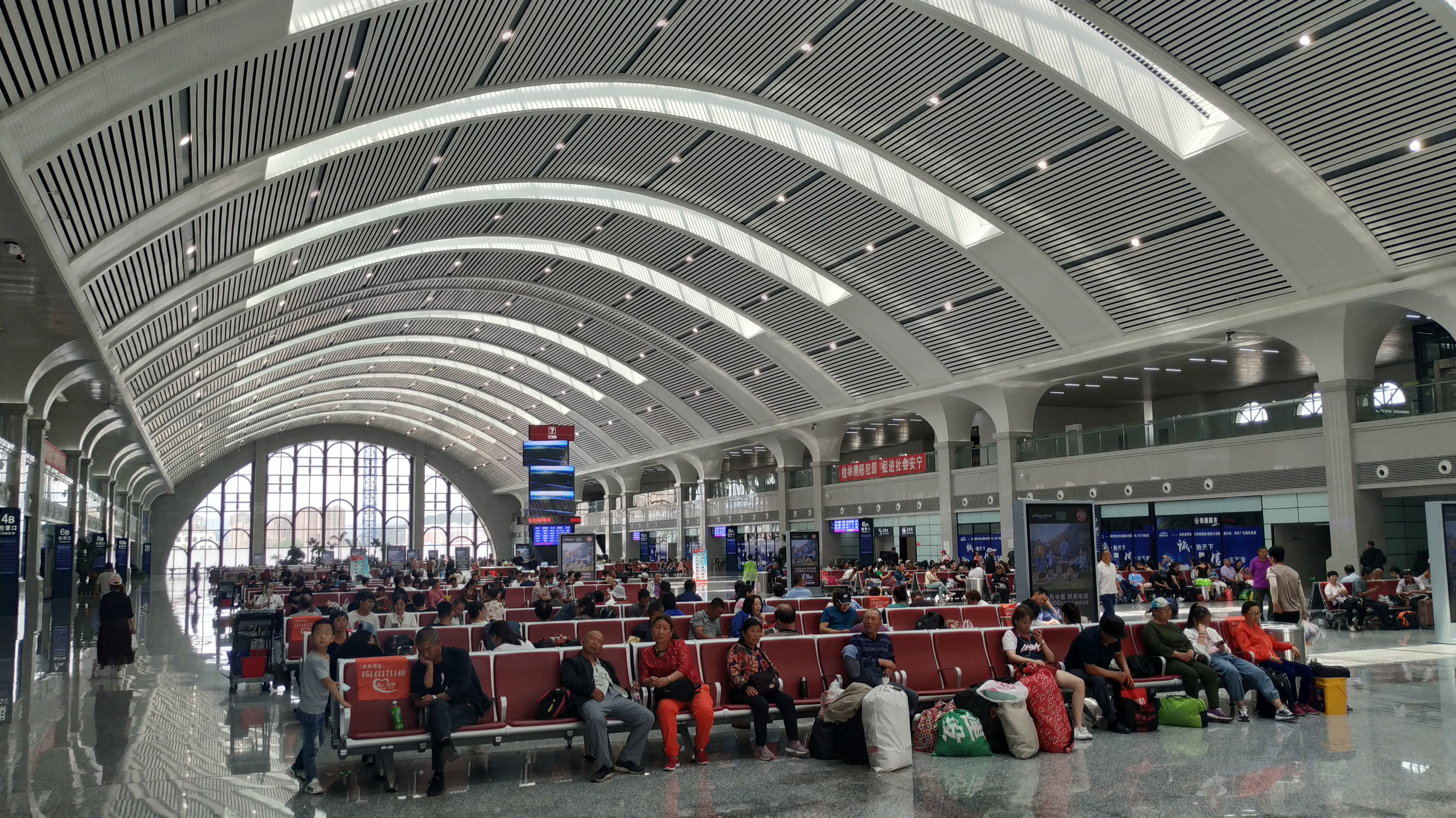 中文（中国大陆）: 牡丹江站站房内